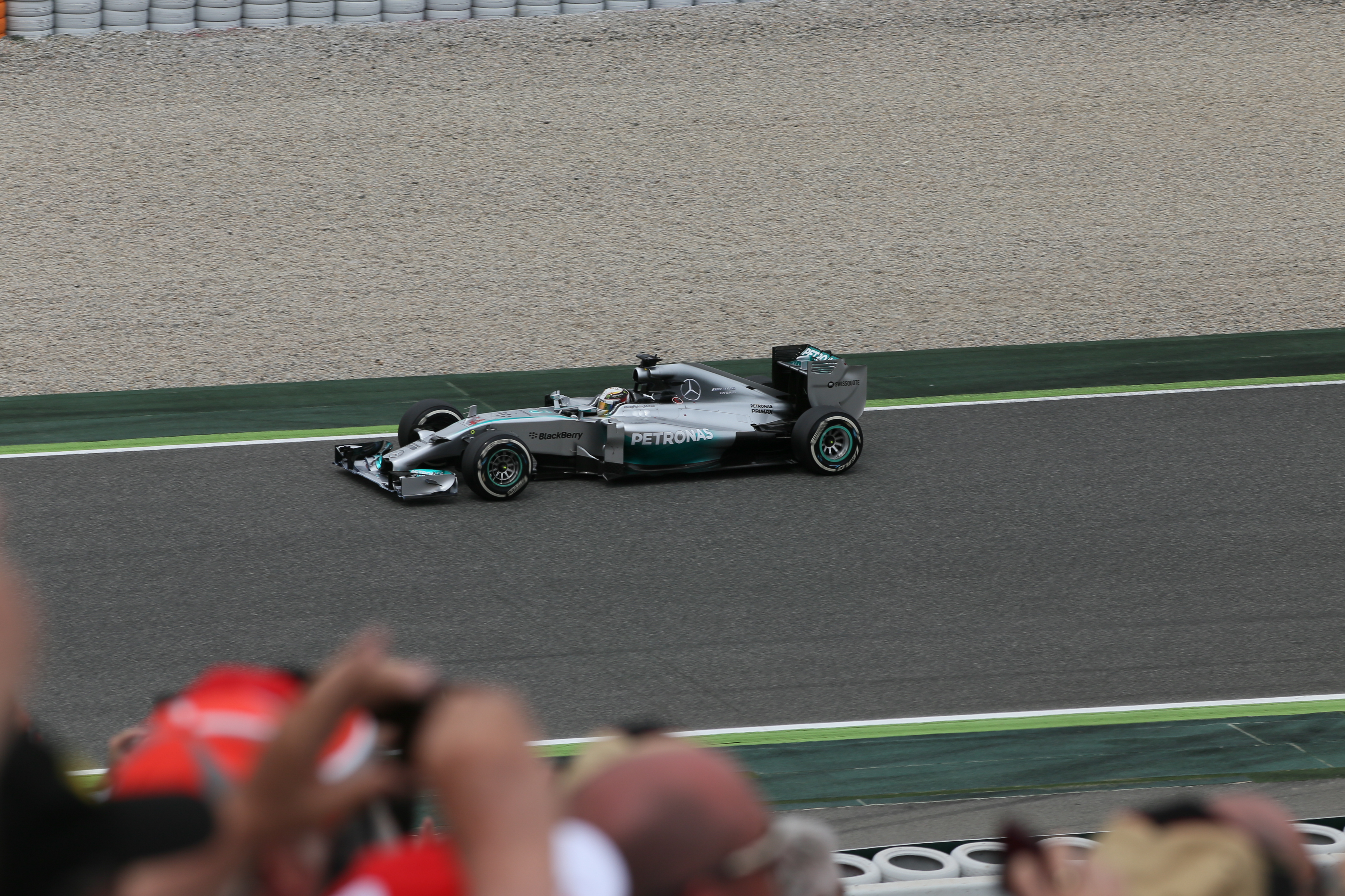 Lewis Hamilton